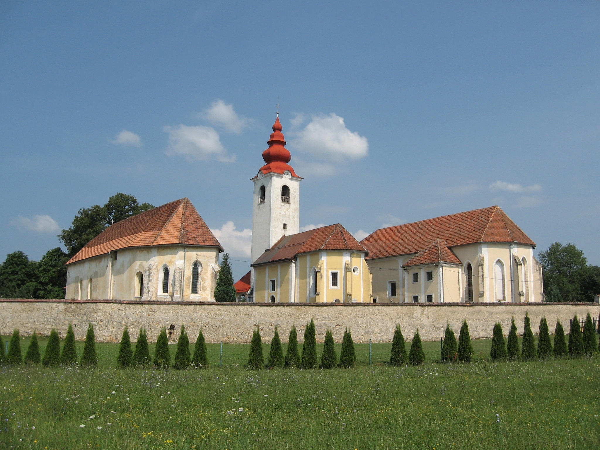 Tri fare Rosalnice Metlika Slovenija